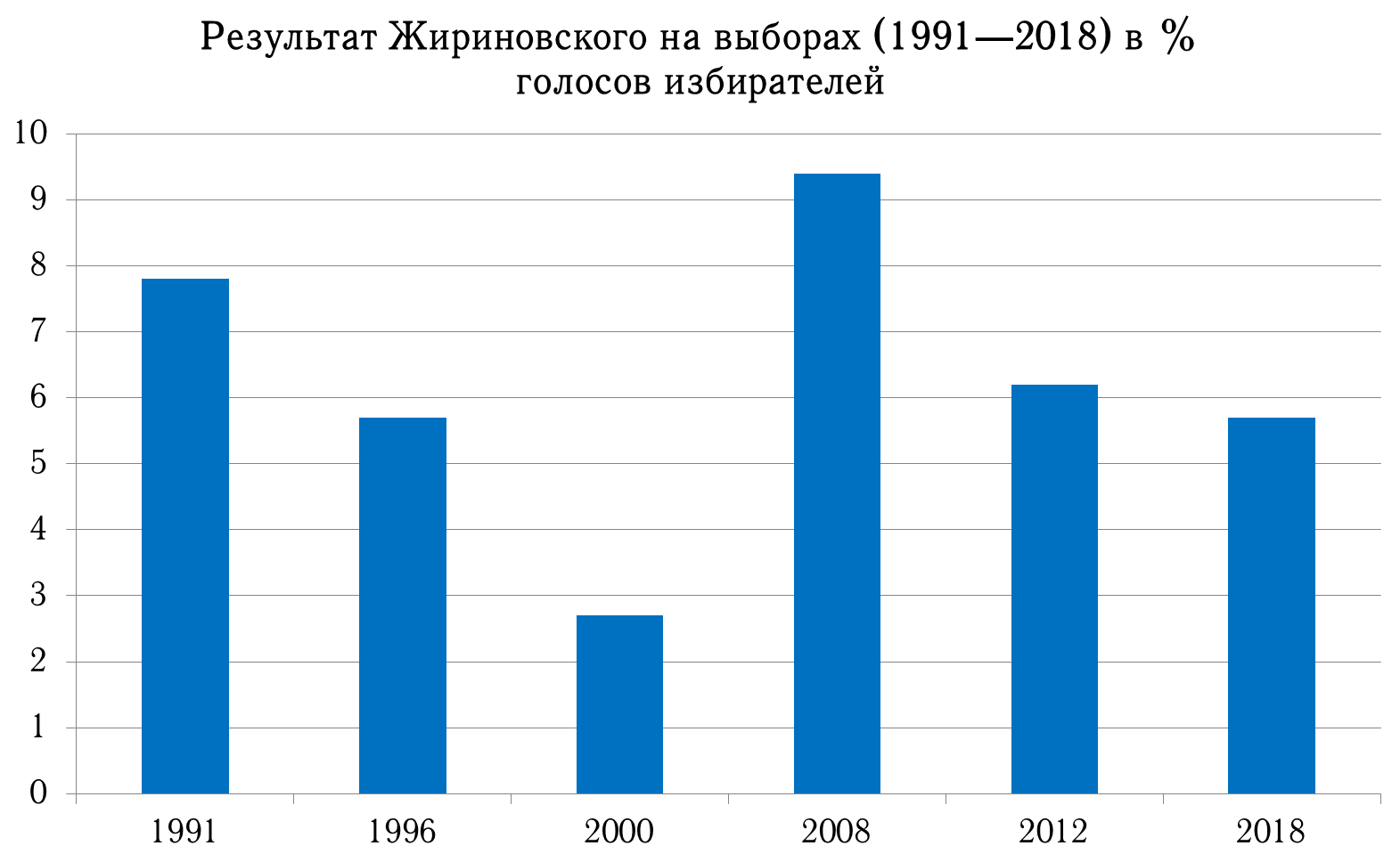 Результат Владимира Жириновского на президентских выборах с 1991 по 2018 годы